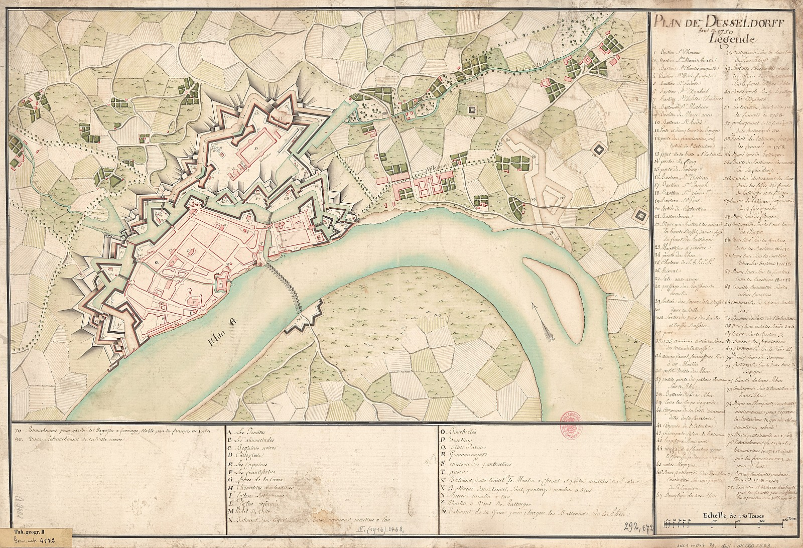 Plan de Düsseldorf: levé en 1759. - [Ca. 1:4 532]. - [S.l.], 1759. - 1 Kt. kolor. Handzeichng. 58 x 37 cm